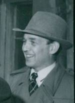 Ulf Bjuggren (1908-1979), svensk ingenjör.